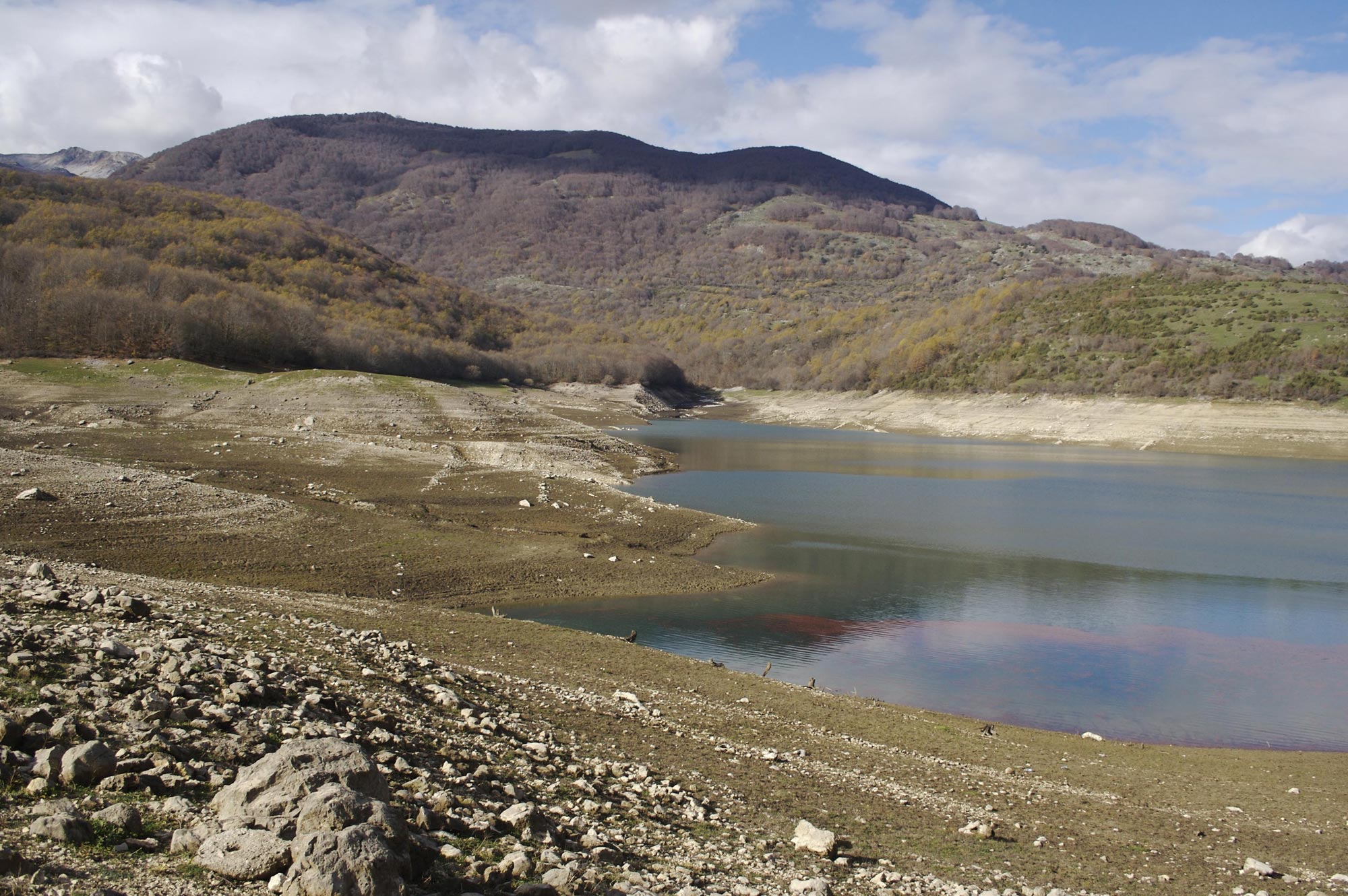 Paesaggio montano dell'Abruzzo